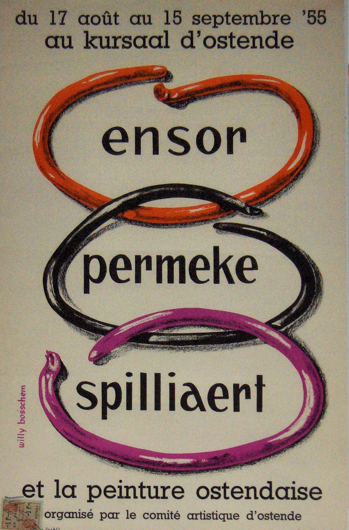 Affiche : Ensor, Permeke, Spilliaert et la peinture Ostendaise; Kursaal, Oostende (1955)